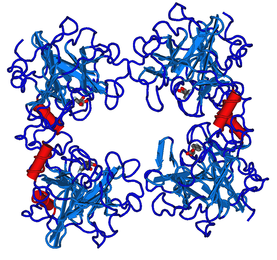 1A0L_Human_Beta-Tryptase